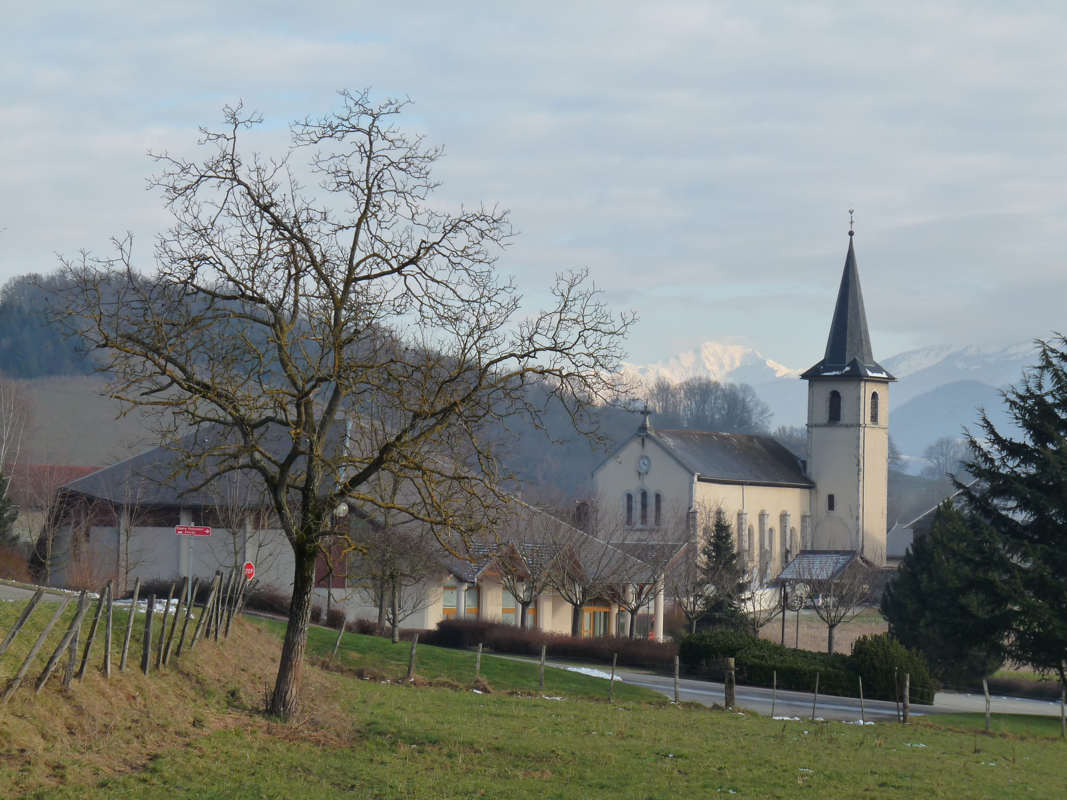 Eglise de Ste Hélène du Lac sur fond de Mont-Blanc